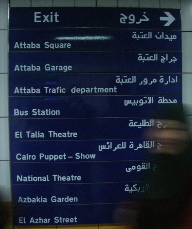 Cairo, Egypt